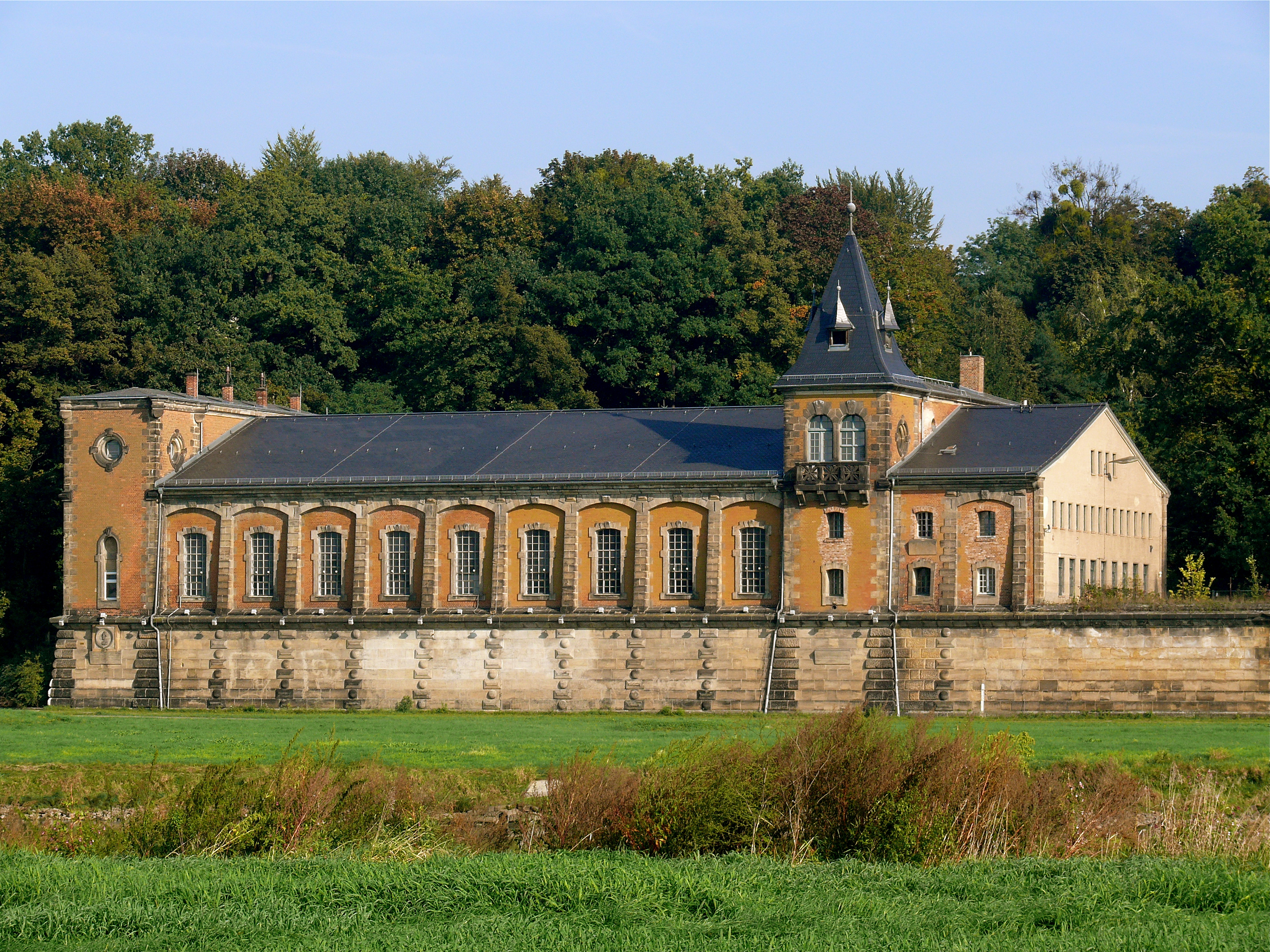 Historisches Wasserwerk "Saloppe" in Dresden